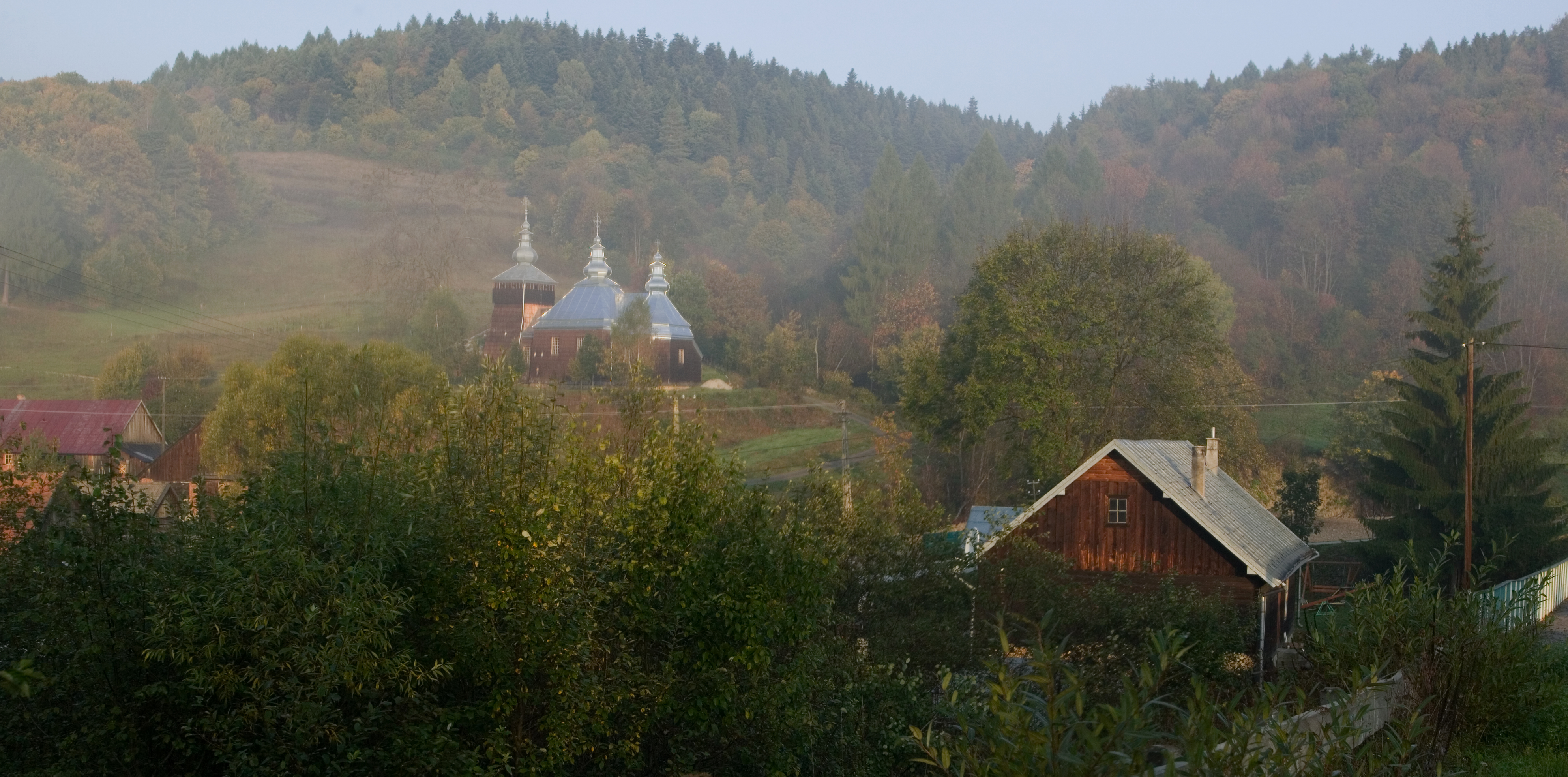 Kunkowa, dawna cerkiew greckokatolicka, obecnie prawosławna, p.w. św. Łukasza